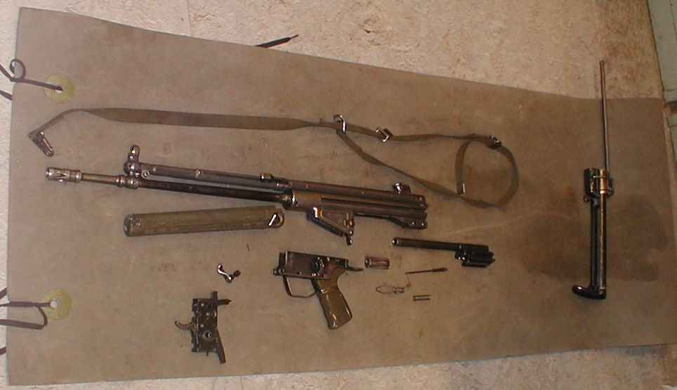 AG-3, dis-assembled